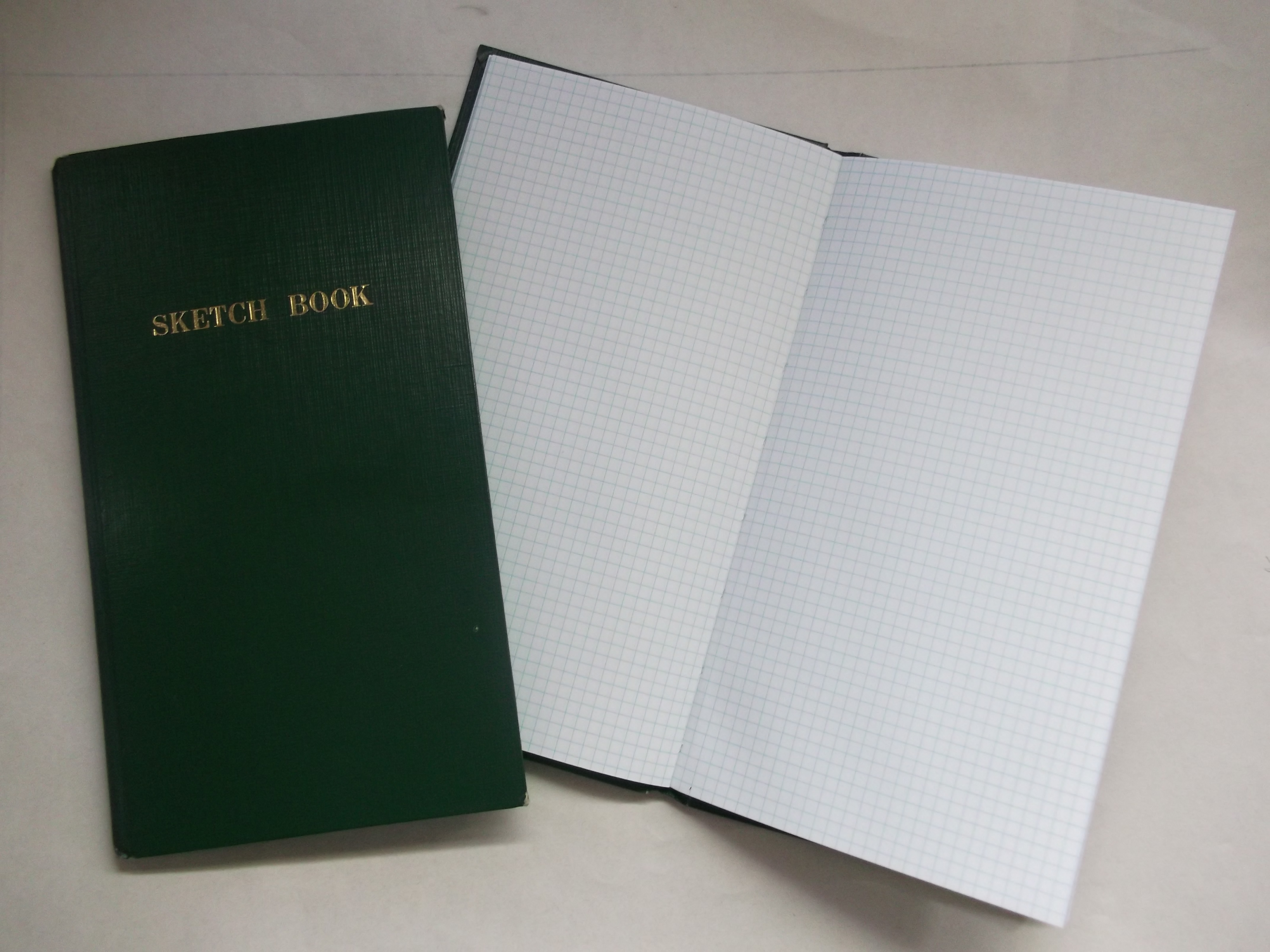 コクヨの測量野帳(セ-Y3)、表紙と方眼ページを開いた状態を示す